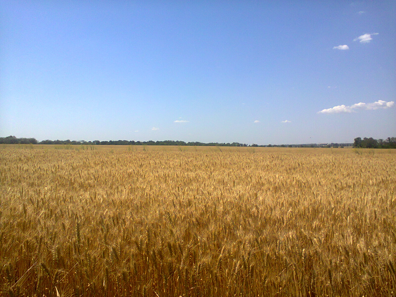 Пшеничное поле на южной окраине поселка Водянское, Добропольский район.